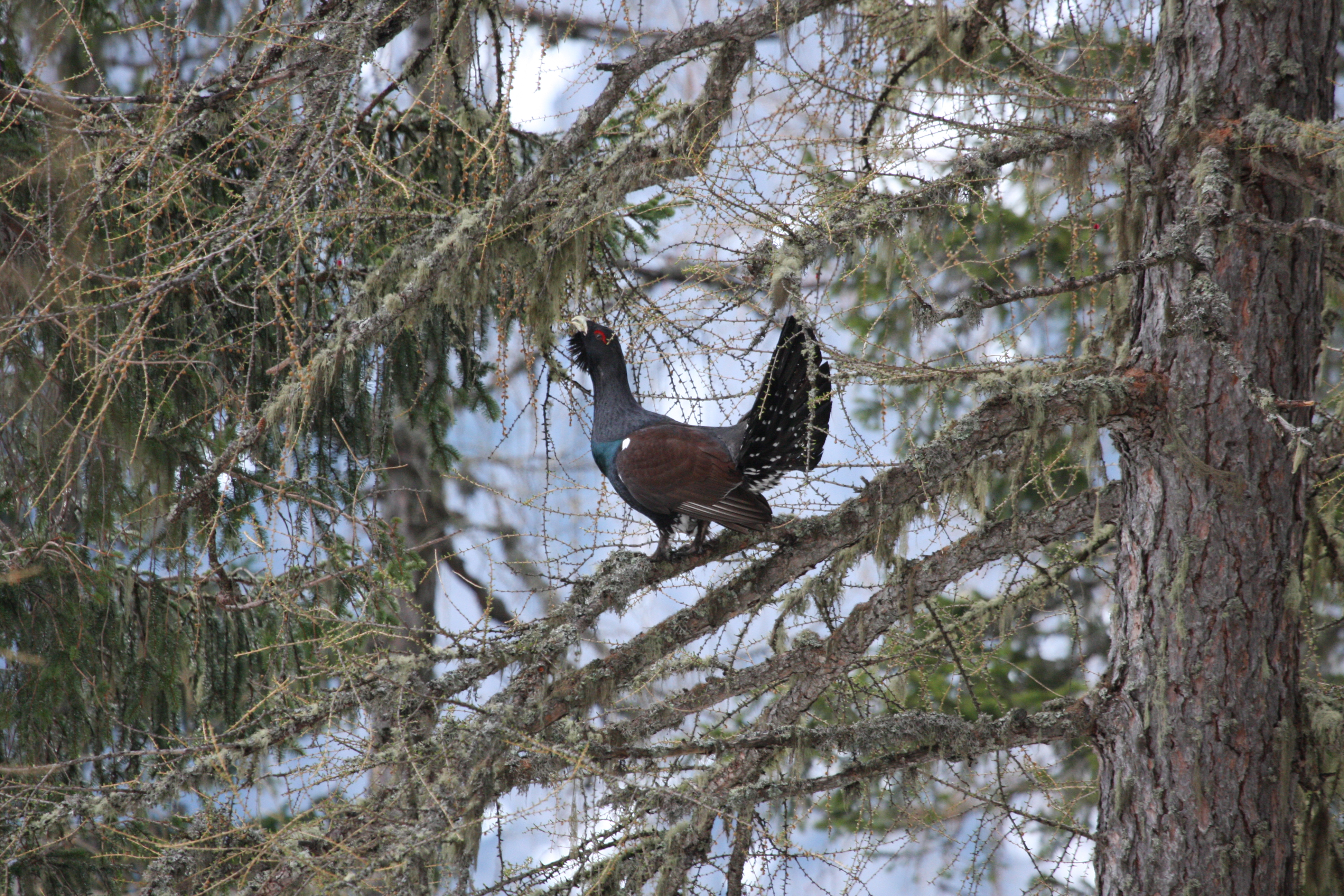 Gallo cedrone ph Giovanni Pelucchi